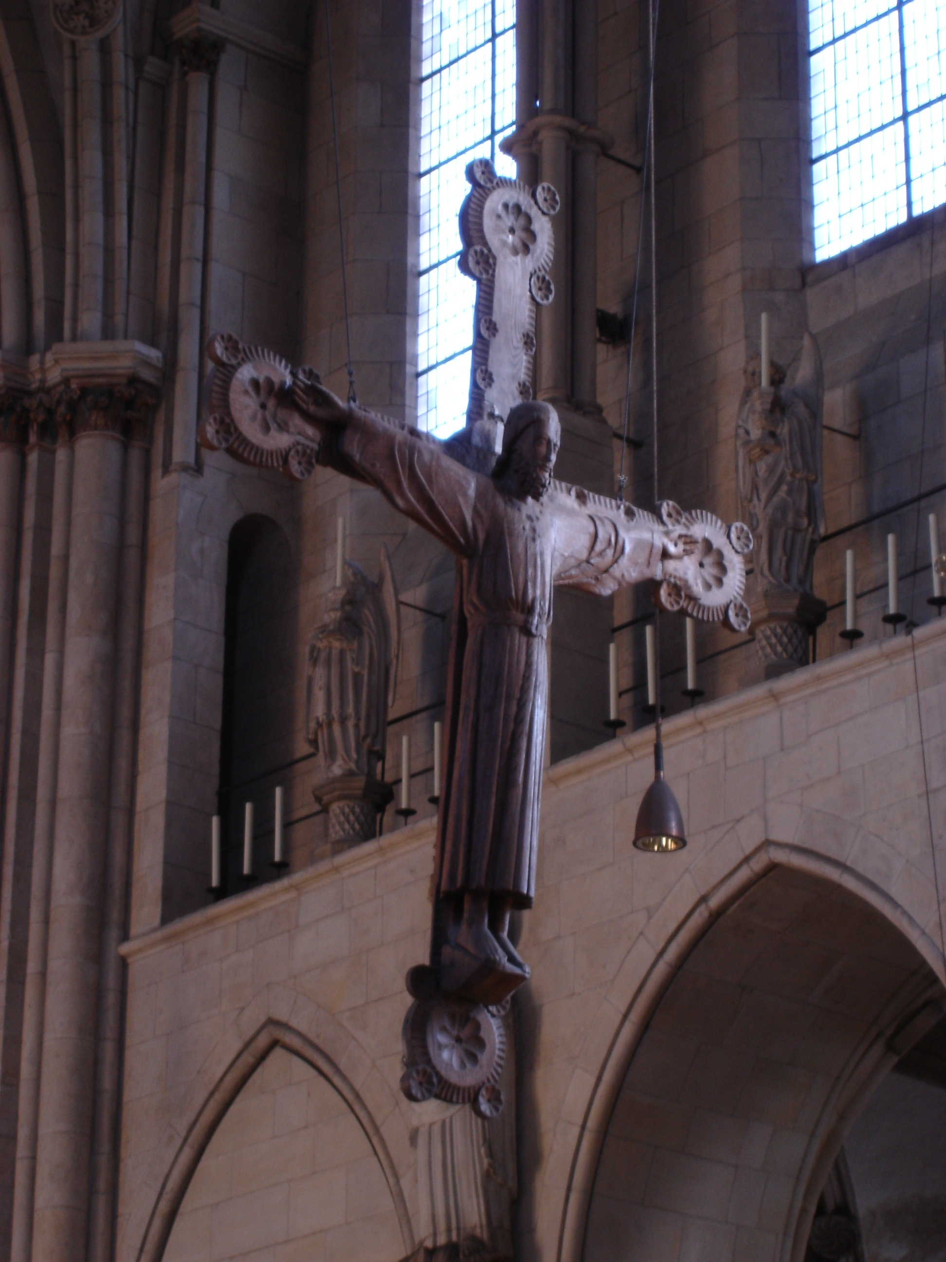 Triumpfkreuz in the St.-Pauls-Cathedral in Münster, Westphalia, Germany